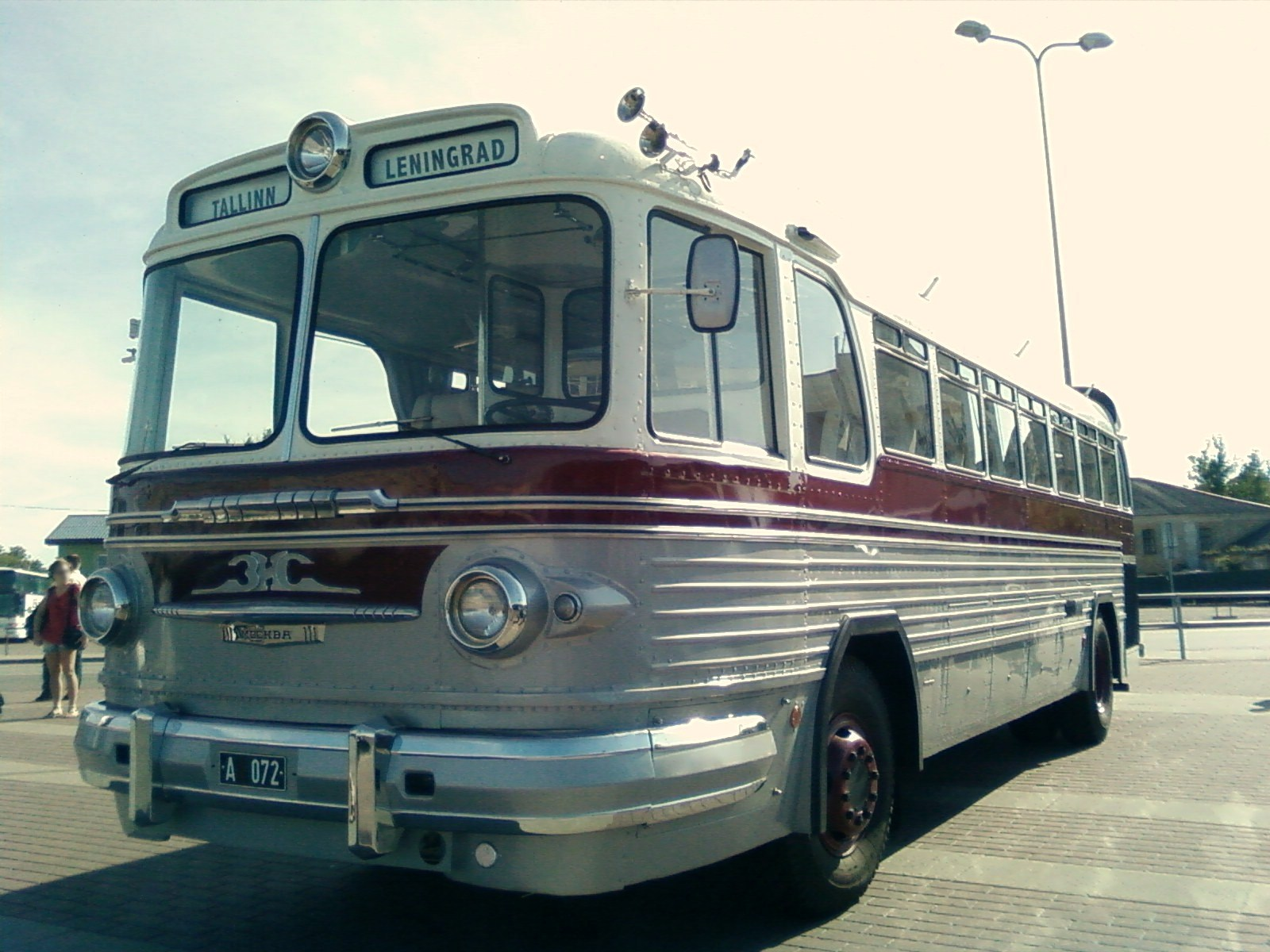 ZiS-127 Tallinna autobussijaamas